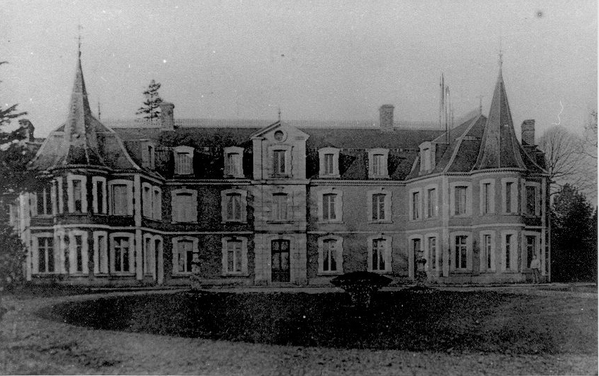 Ochancourt, Somme, France, le château, rue de Nibas, au début du XXè siècle.